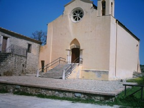 foto scattata da me.Aprile 2007